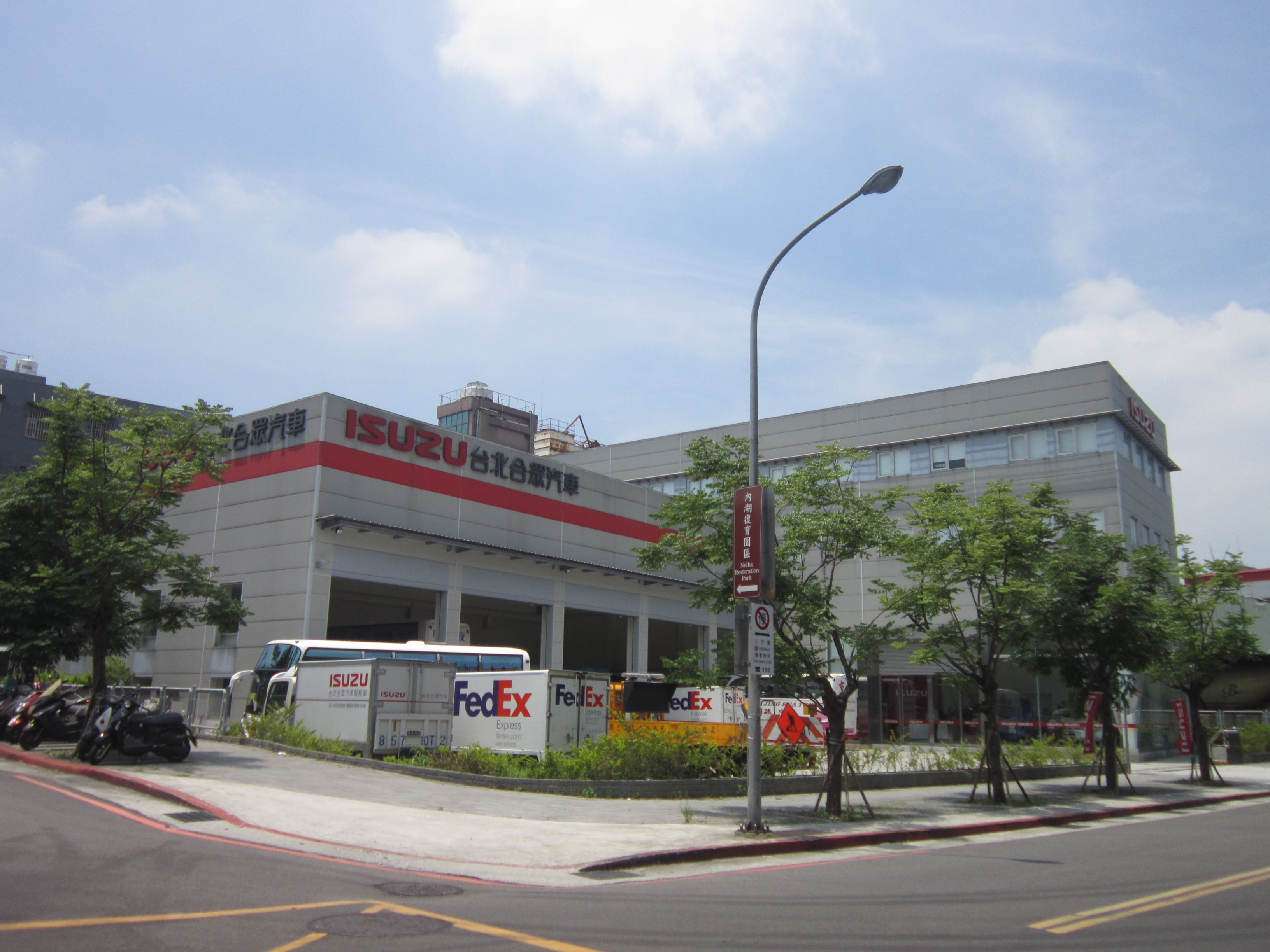 台北合眾汽車總部及東台北營業所，位於臺北市內湖區永保街188號。